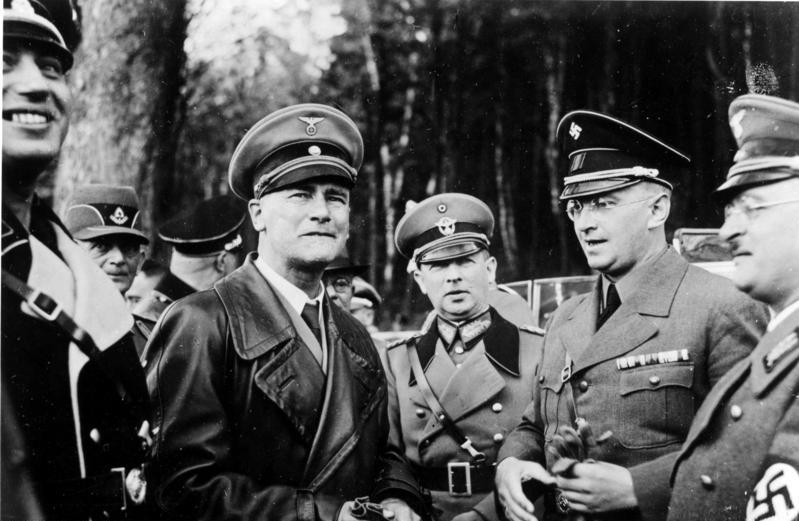 Staatsbesuch des Reichs- und Preußischen Ministers des Innern Dr. Wilhelm Frick in Süeddeutschland Dr. Stuckart, Dr. Frick (2.v.l.), v. Bomhard, Henlein (2.v.r.), Krebs